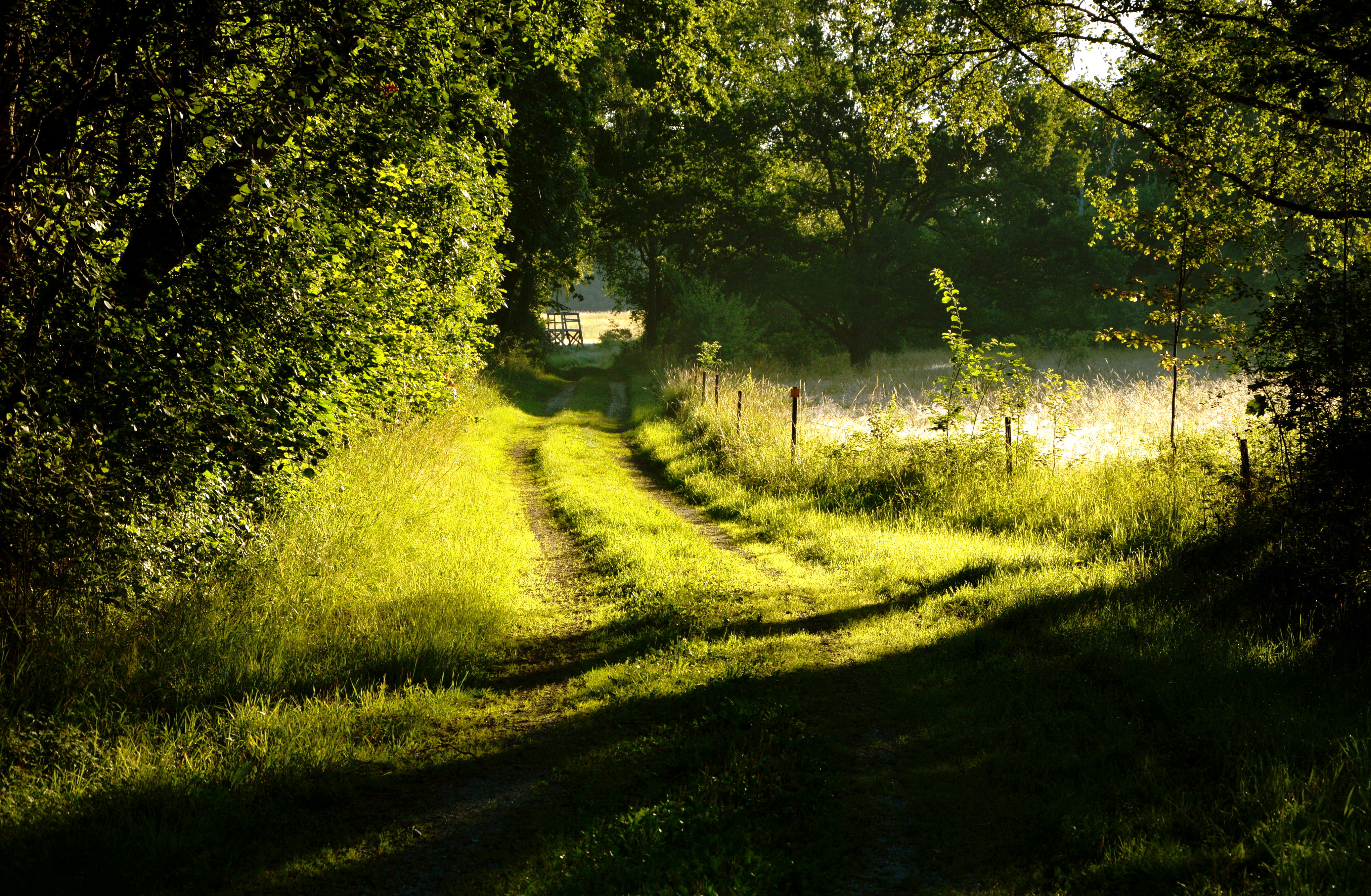 Precis vid besöksparkeringen.